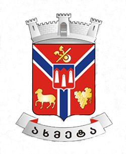 Герб города Ахмта